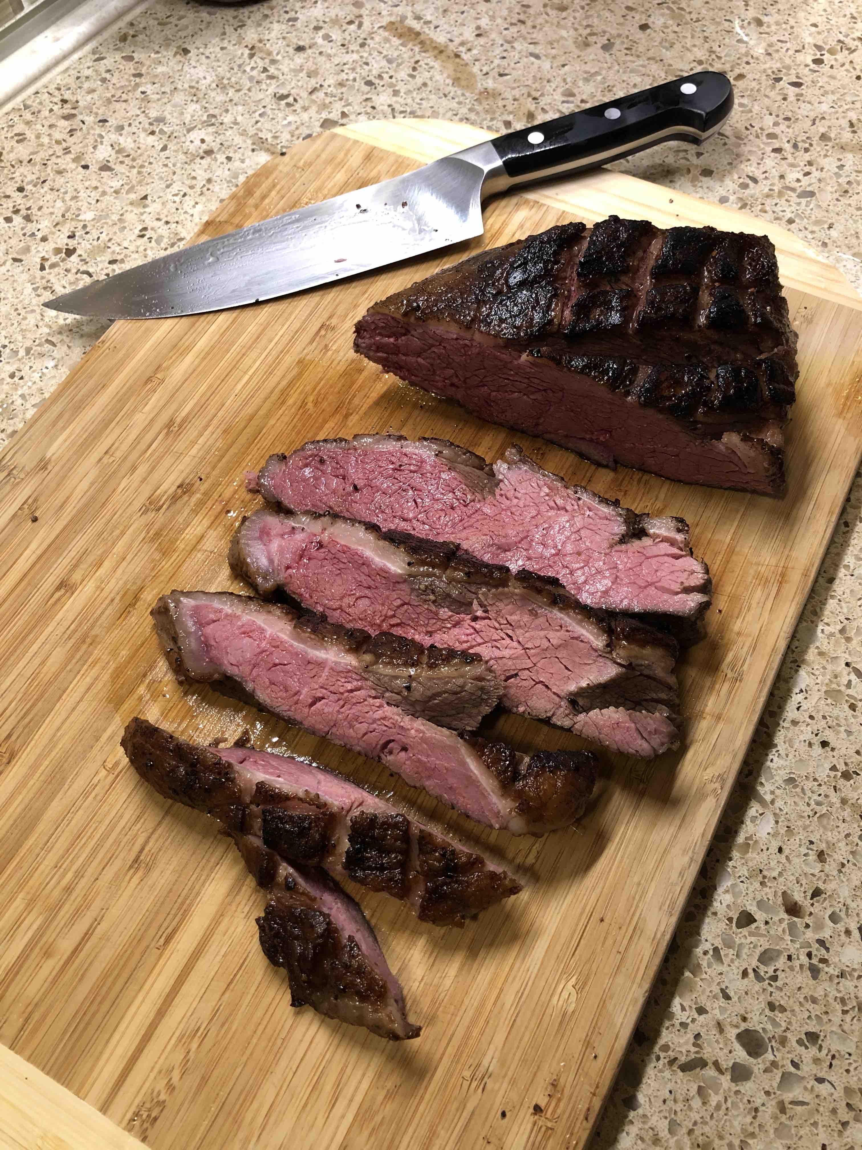 פיקניה לאחר הכנה בסו-וויד וצליה